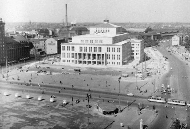 Leipzig, Karl-Marx-Platz, Opernhaus Zentralbild Koch 24.9.1960 Ansicht des neuerbauten Opernhauses in Leipzig auf dem Karl-Marx-Platz. Die Oper ist von der äußeren wie auch von der Innengestaltung das modernste Theater der DDR. - Bald werden die Gerüste an der Außenfront des modernen Gebäudes ganz fallen.